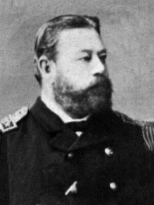 Enrique Simpson Baeza, (Valparaíso, Chile, 1835 – Valparaíso, Chile, 1901) fue un contraalmirante de la Marina de Chile.